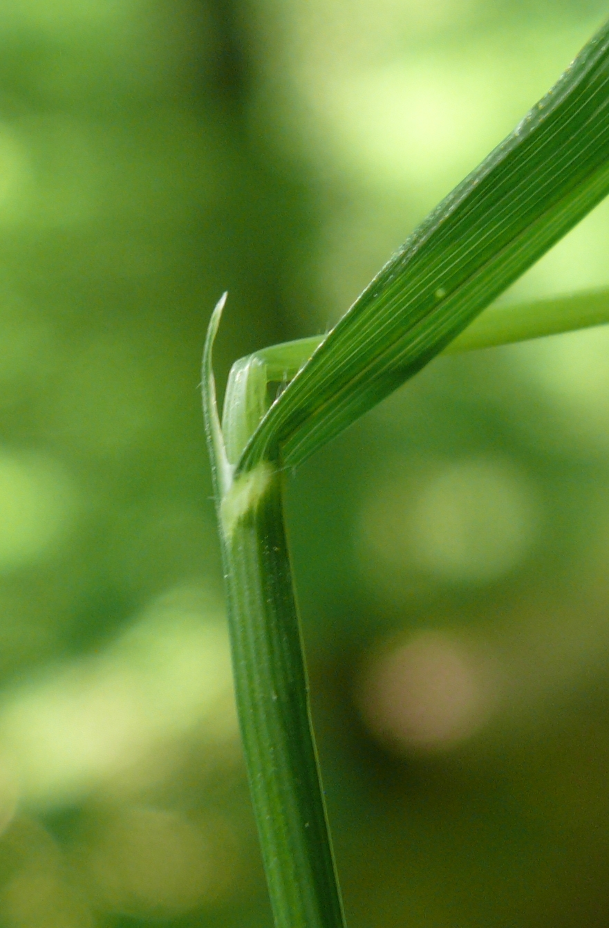 Melica uniflora,Hohenlohe